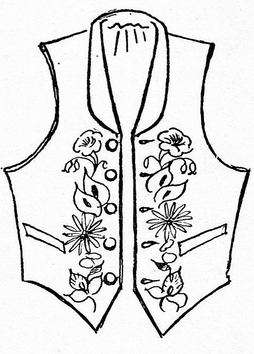 Volkspeledrag: onderbaadjie